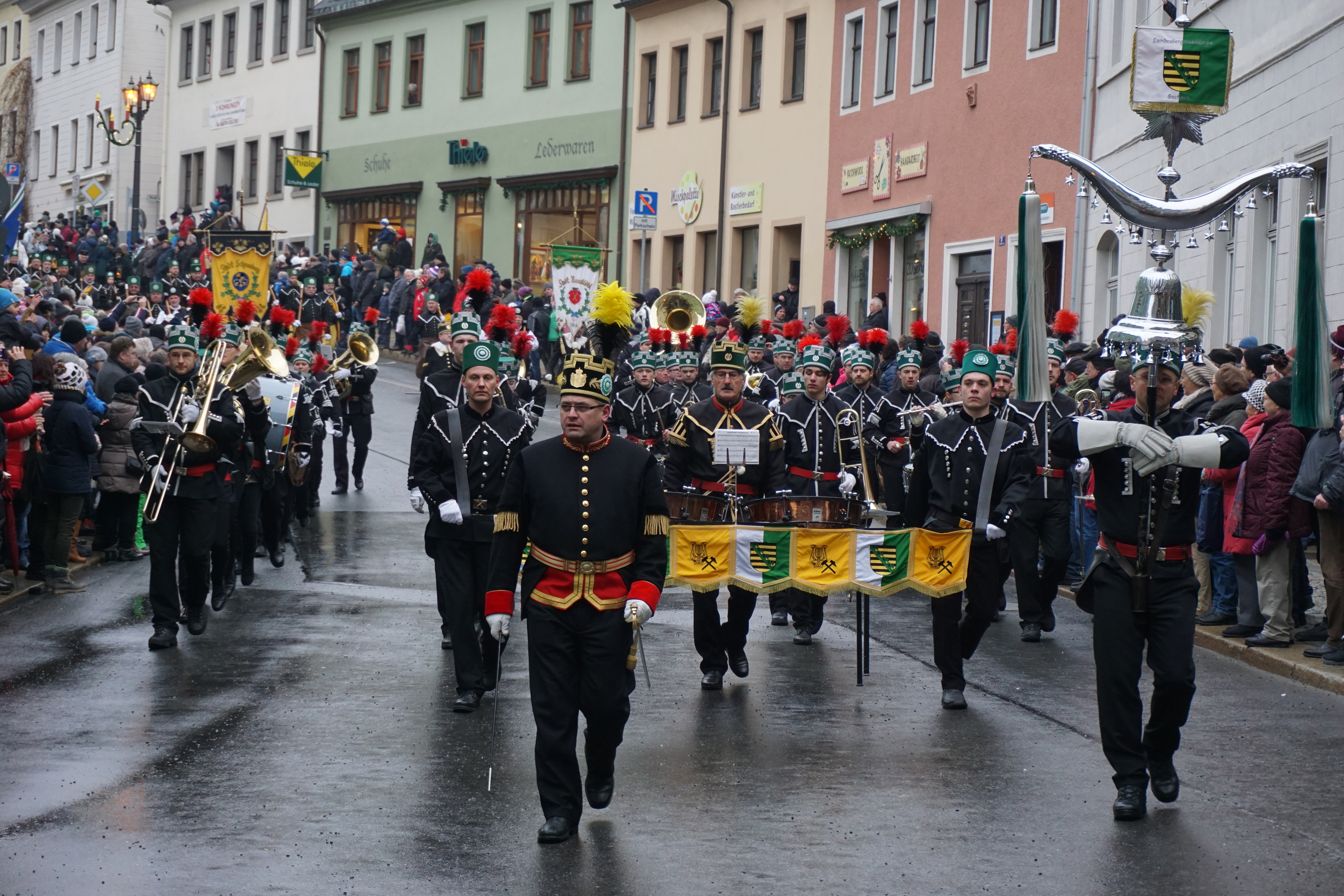 Bergparade in Annaberg-Buchholz 2016, Landesbergmusikkorps Sachsen